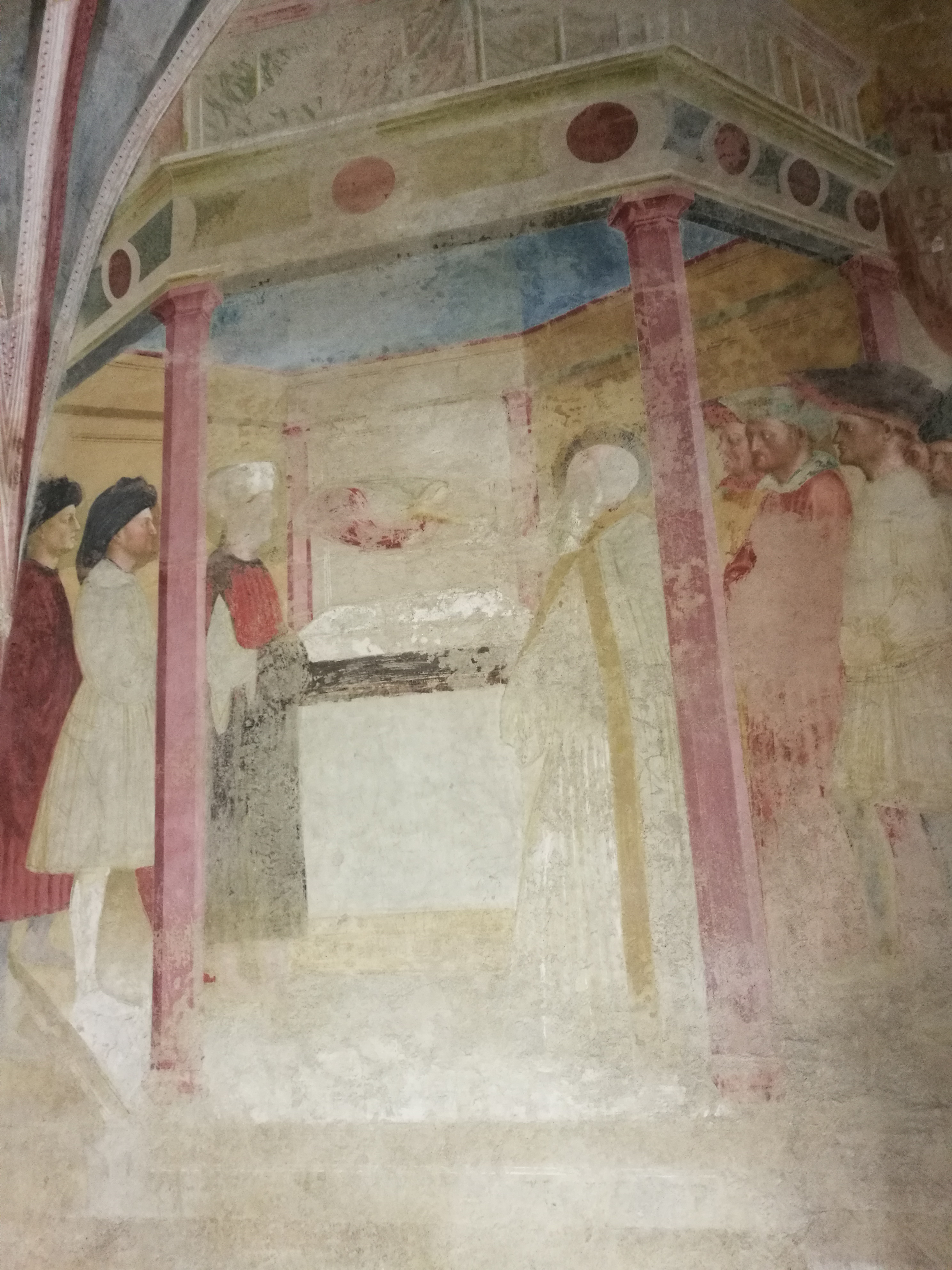 Annunciazione dell'Angelo a S. Zaccaria della nascita del Battista affresco di Masolino da Panicale Battistero di Castiglione Olona